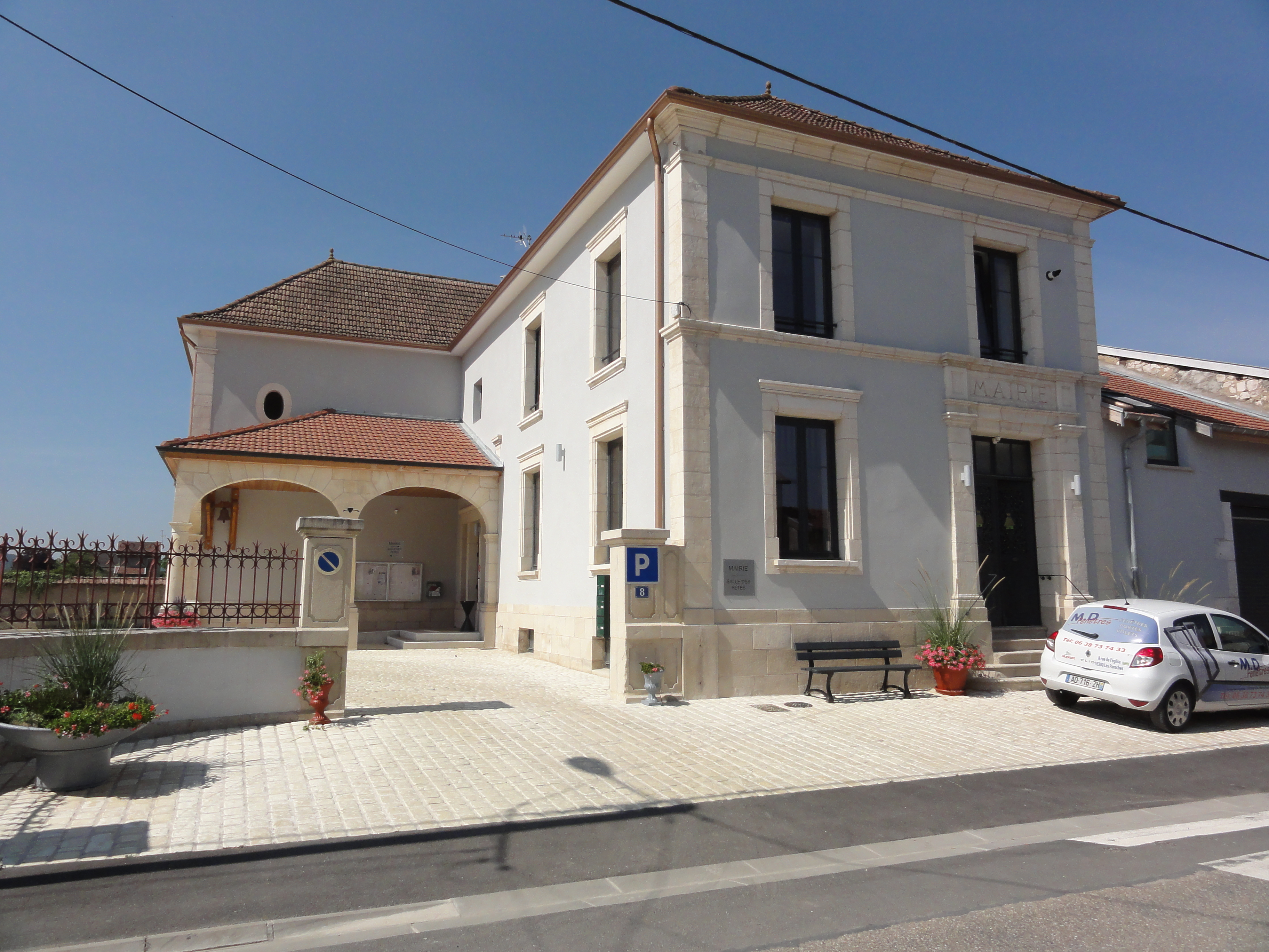 Les Paroches (Meuse) mairie